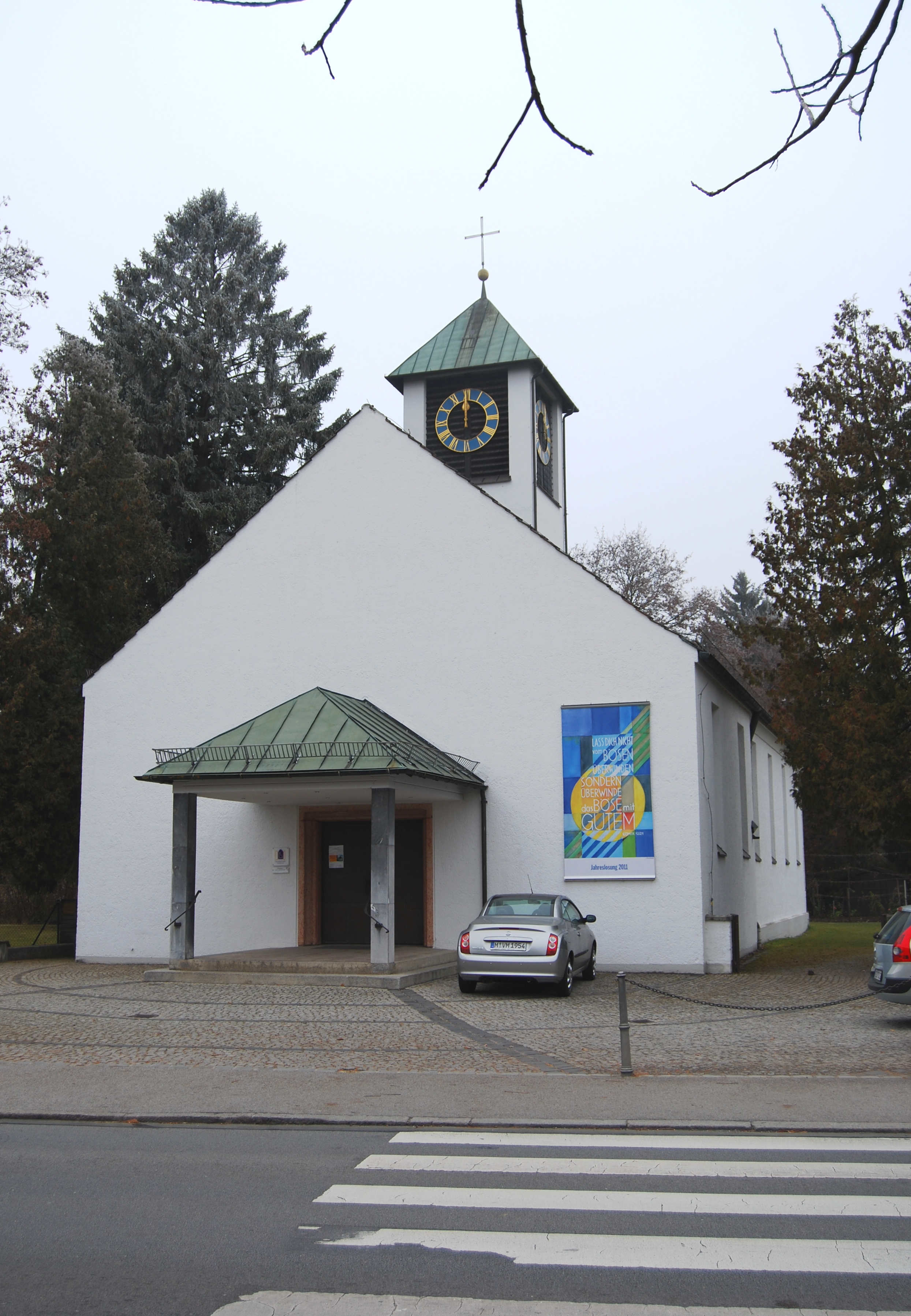 Evangelische Friedenskirche in München-Trudering; Ansicht von Süd-Osten